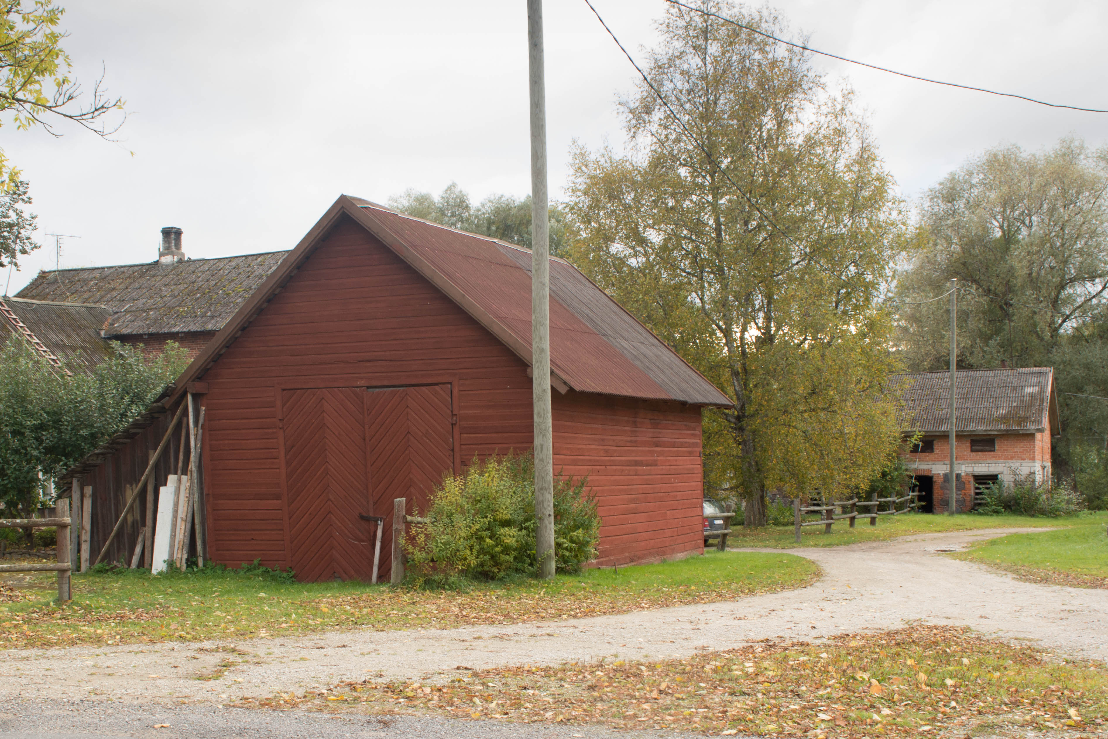 Jäneda mõisa kaalukoda